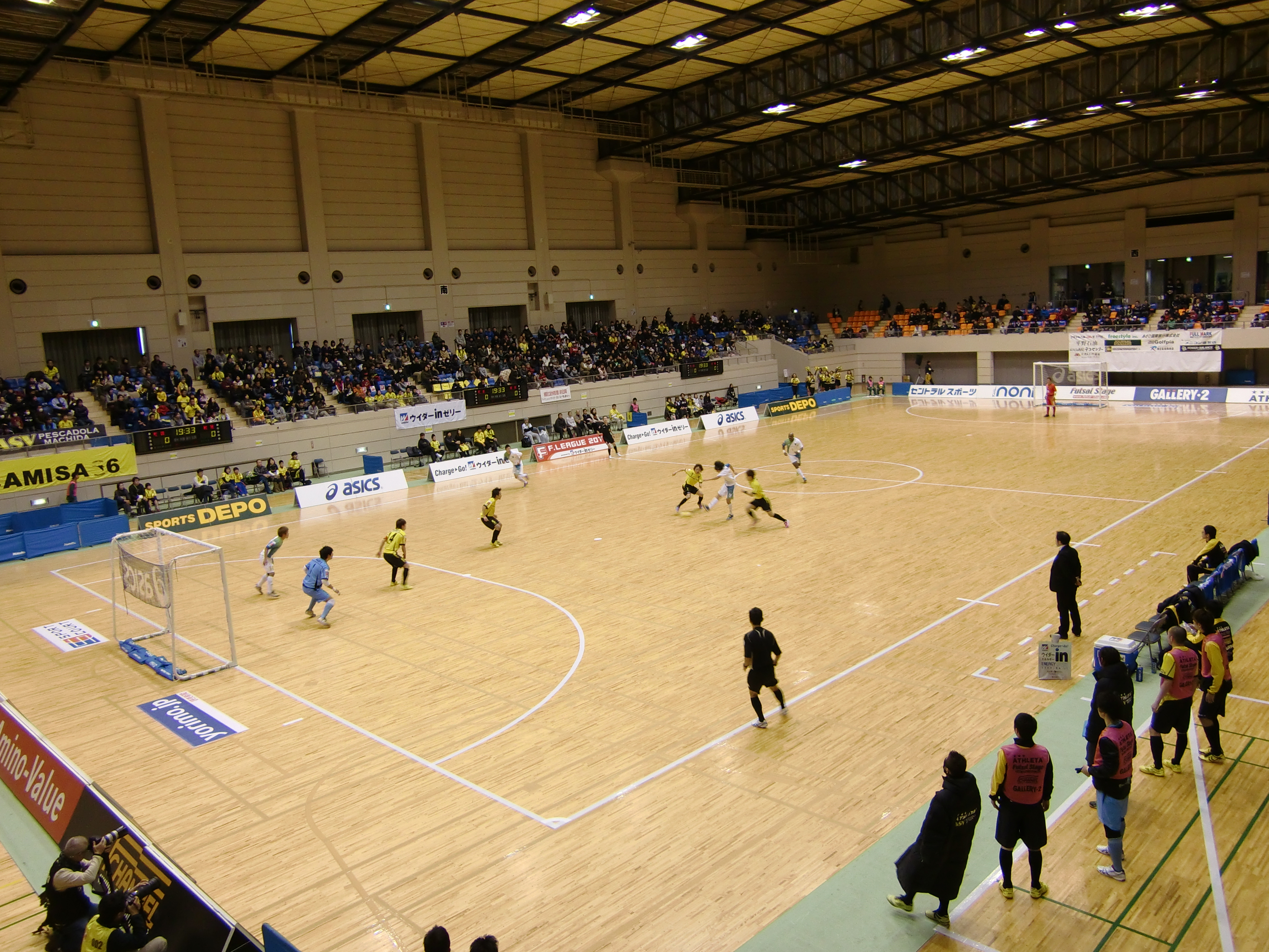 相模原市総合体育館